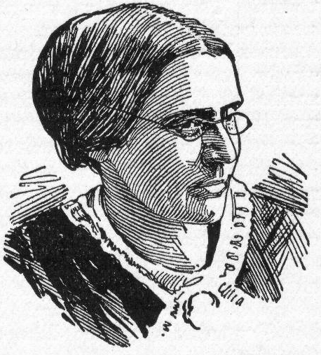 Susan B. Anthony